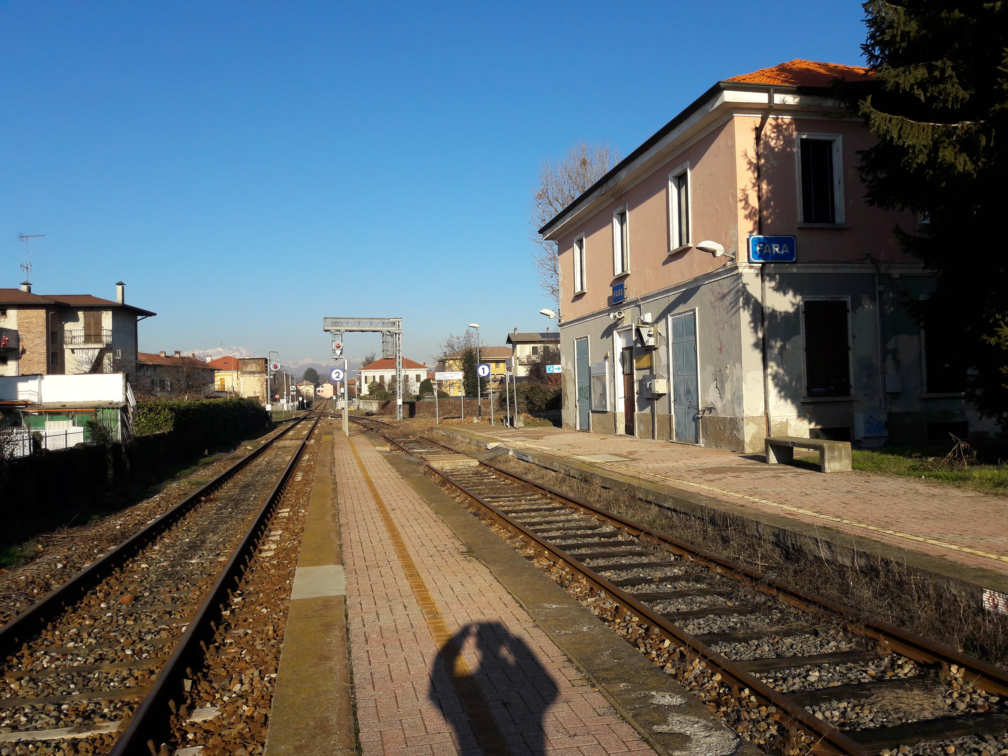 Stazione lato binari, in direzione Varallo Sesia.